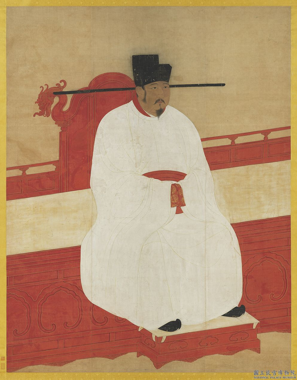 宋英宗坐像 軸